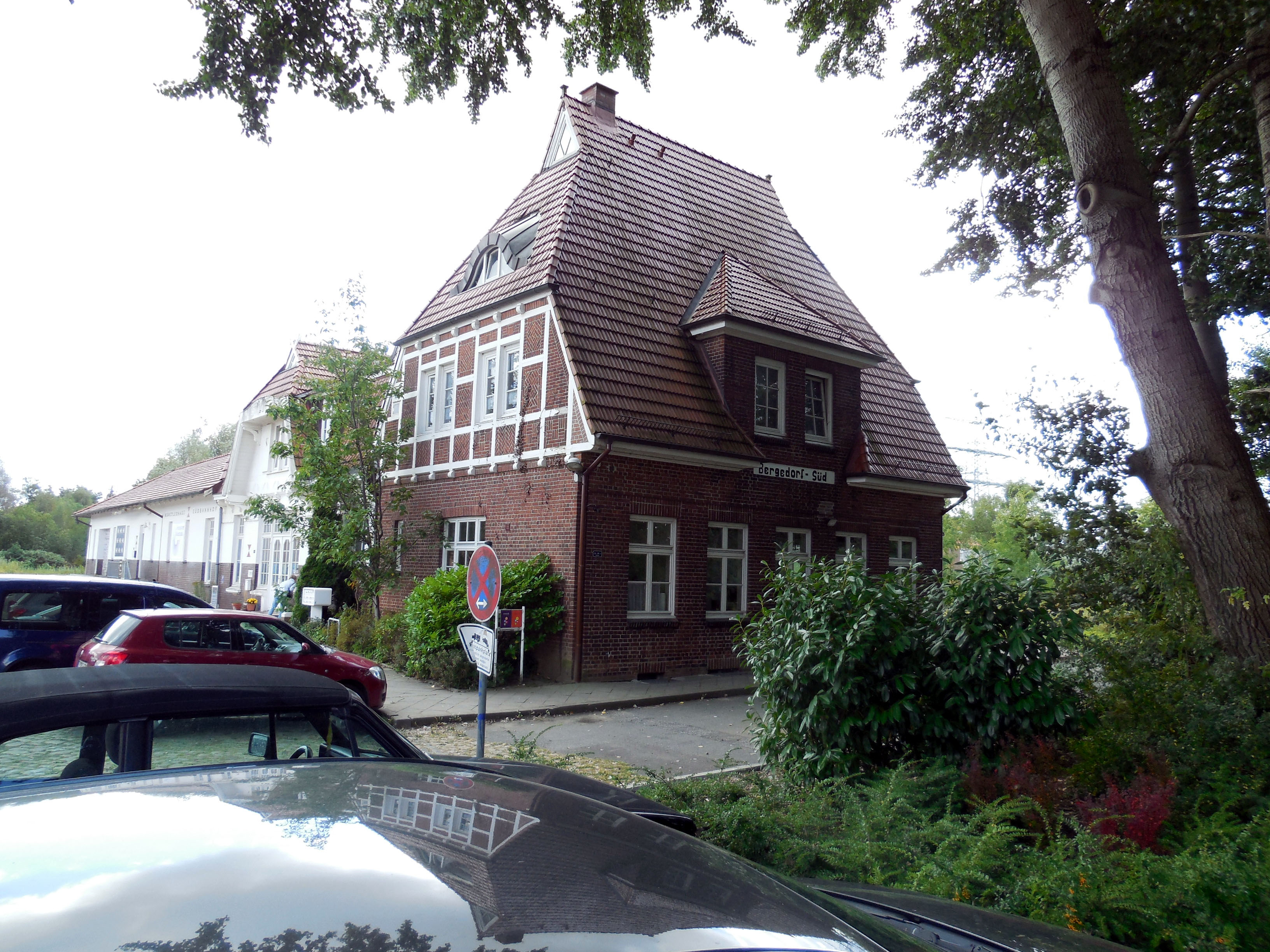 Ehemaliger Bahnhof Bergedorf Sued - Hauptgebaeude